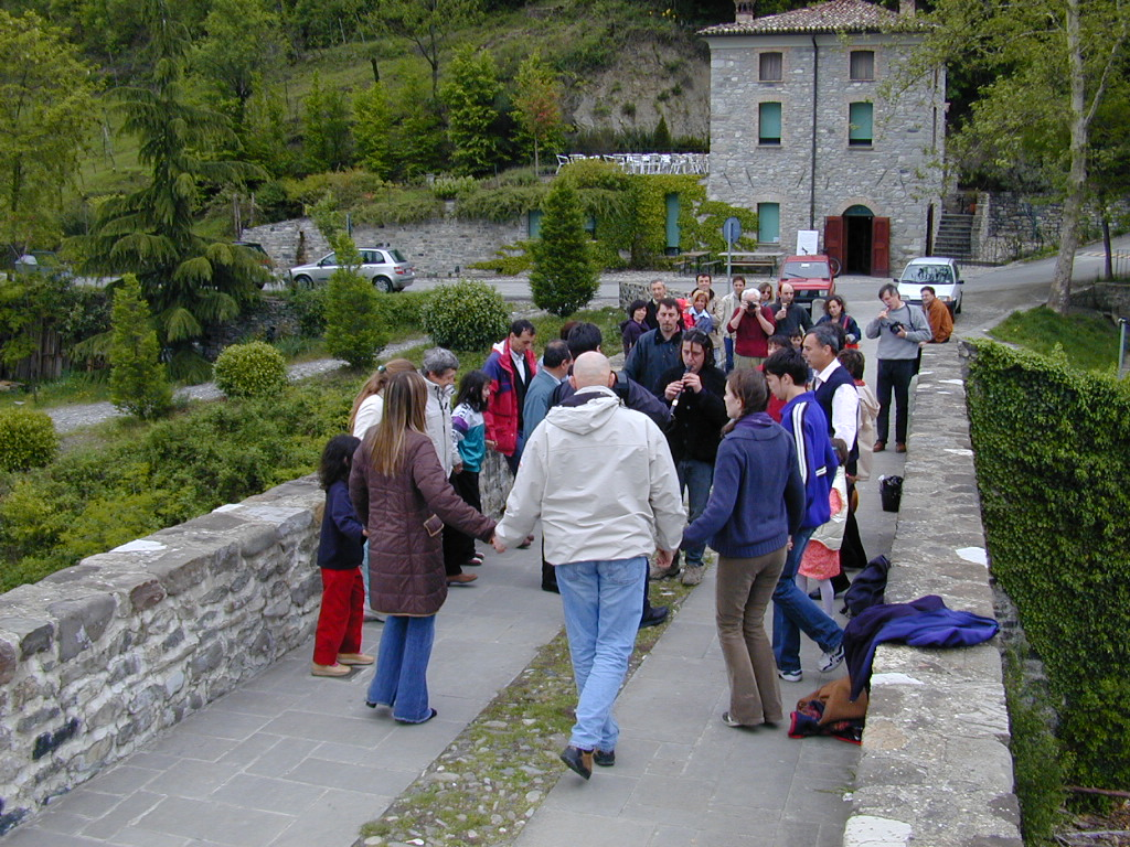 Piana a Bobbio. Foto personale. 2001 Categoria:Immagini di danza Categoria:Immagini delle quattro province